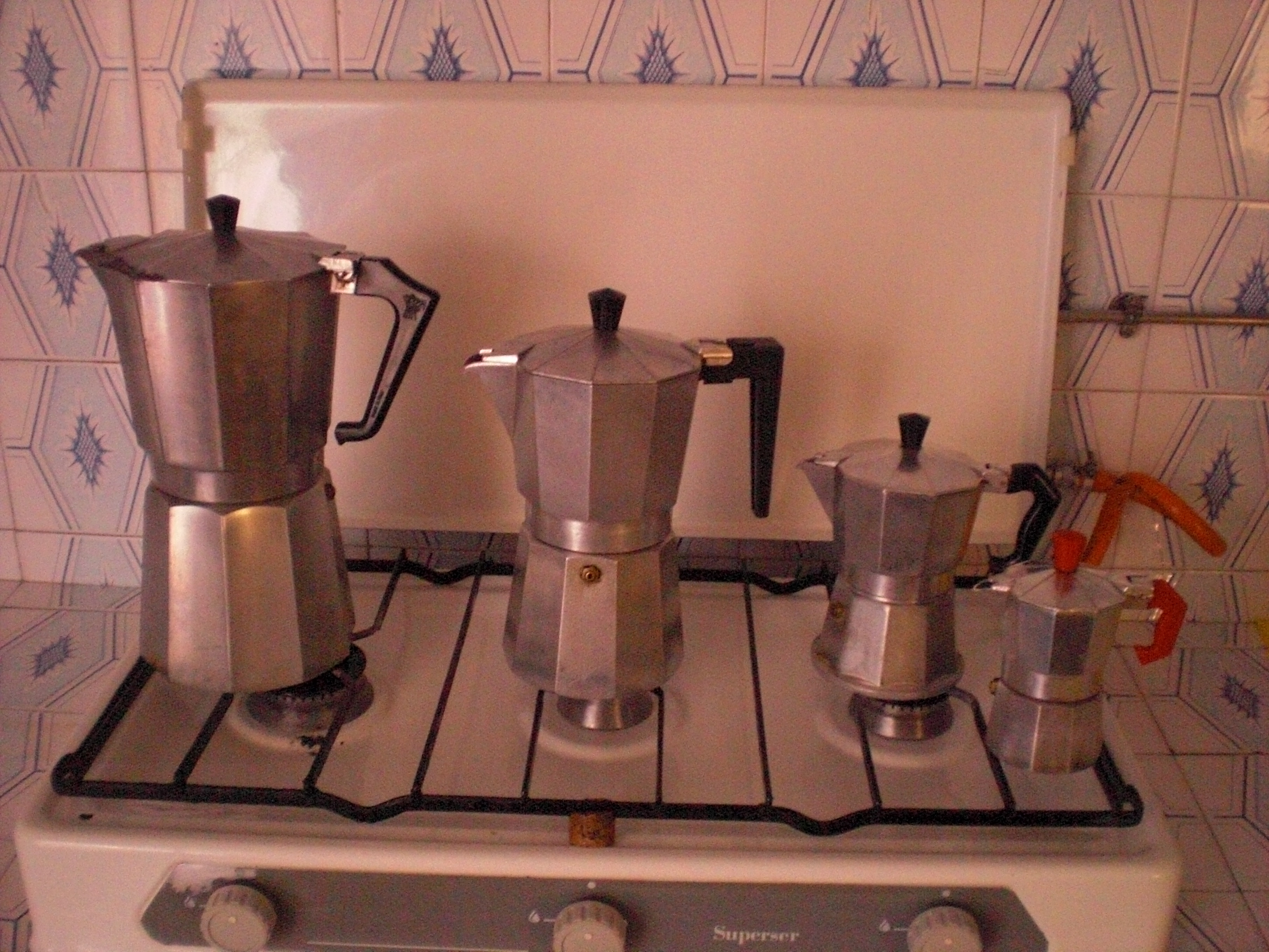 Espreskruĉoj